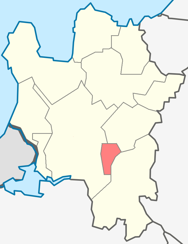 Кингисеппское городское поселение на карте Кингисеппского района